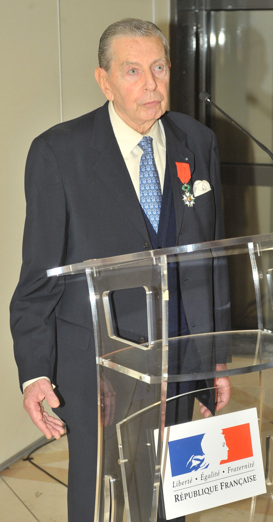 Michel Glotz, impresario et directeur artistique français